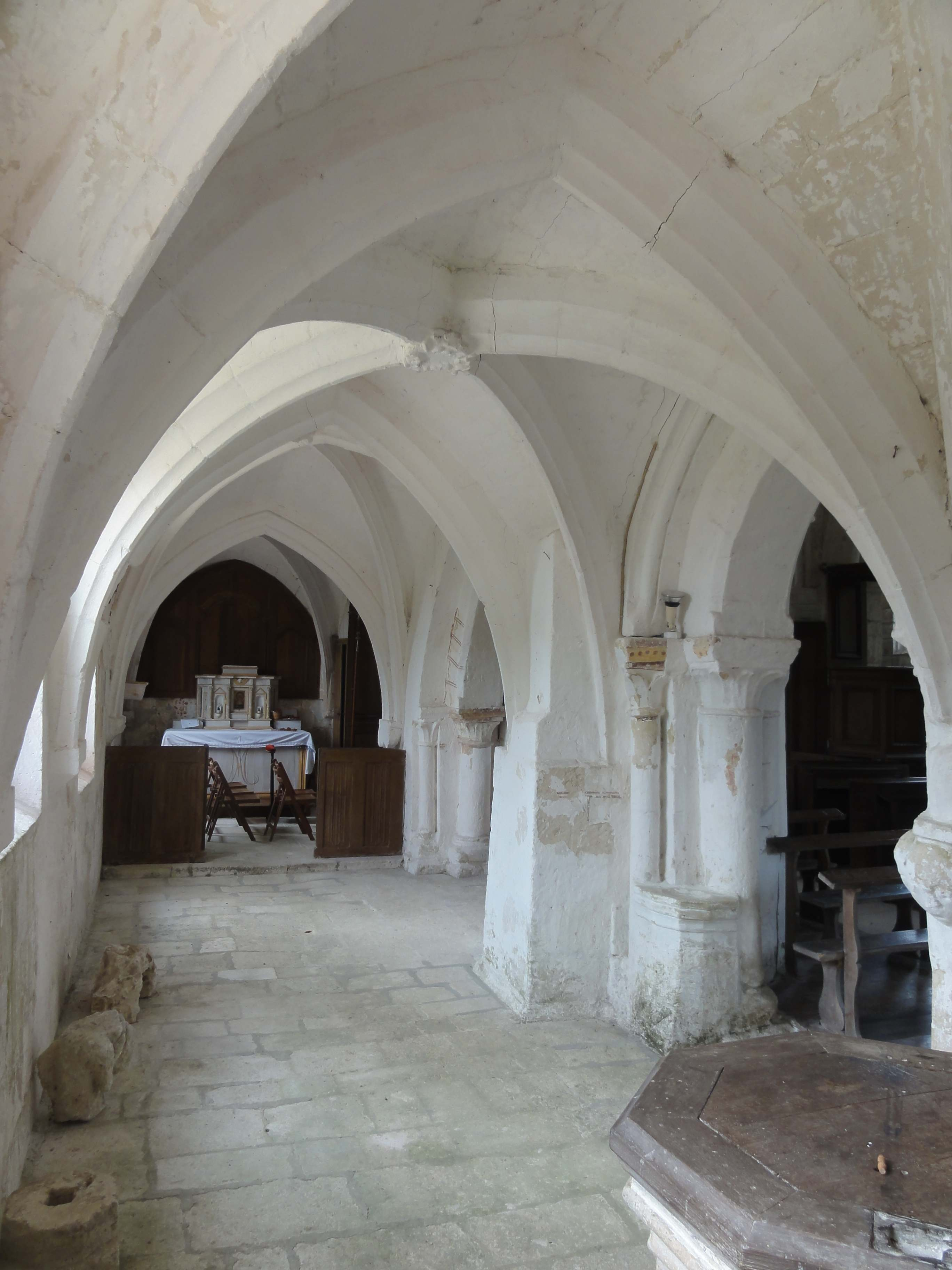 Intérieur de l'église (voir titre).